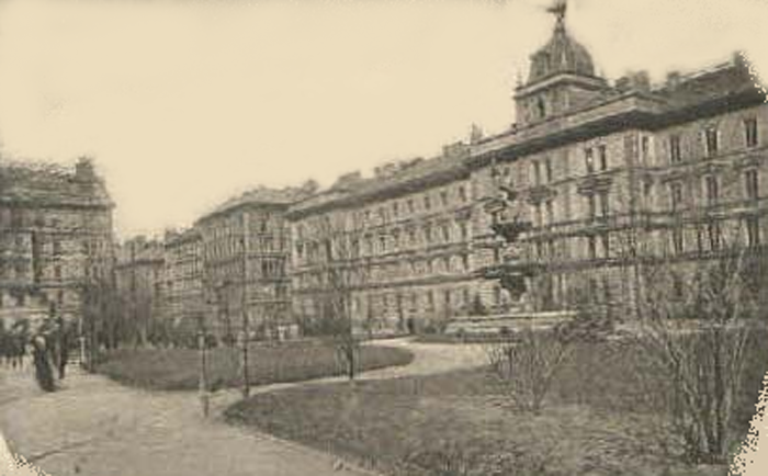 Ehemalige K.u.k. Albrechts-Kaserne in Prag-Smichov